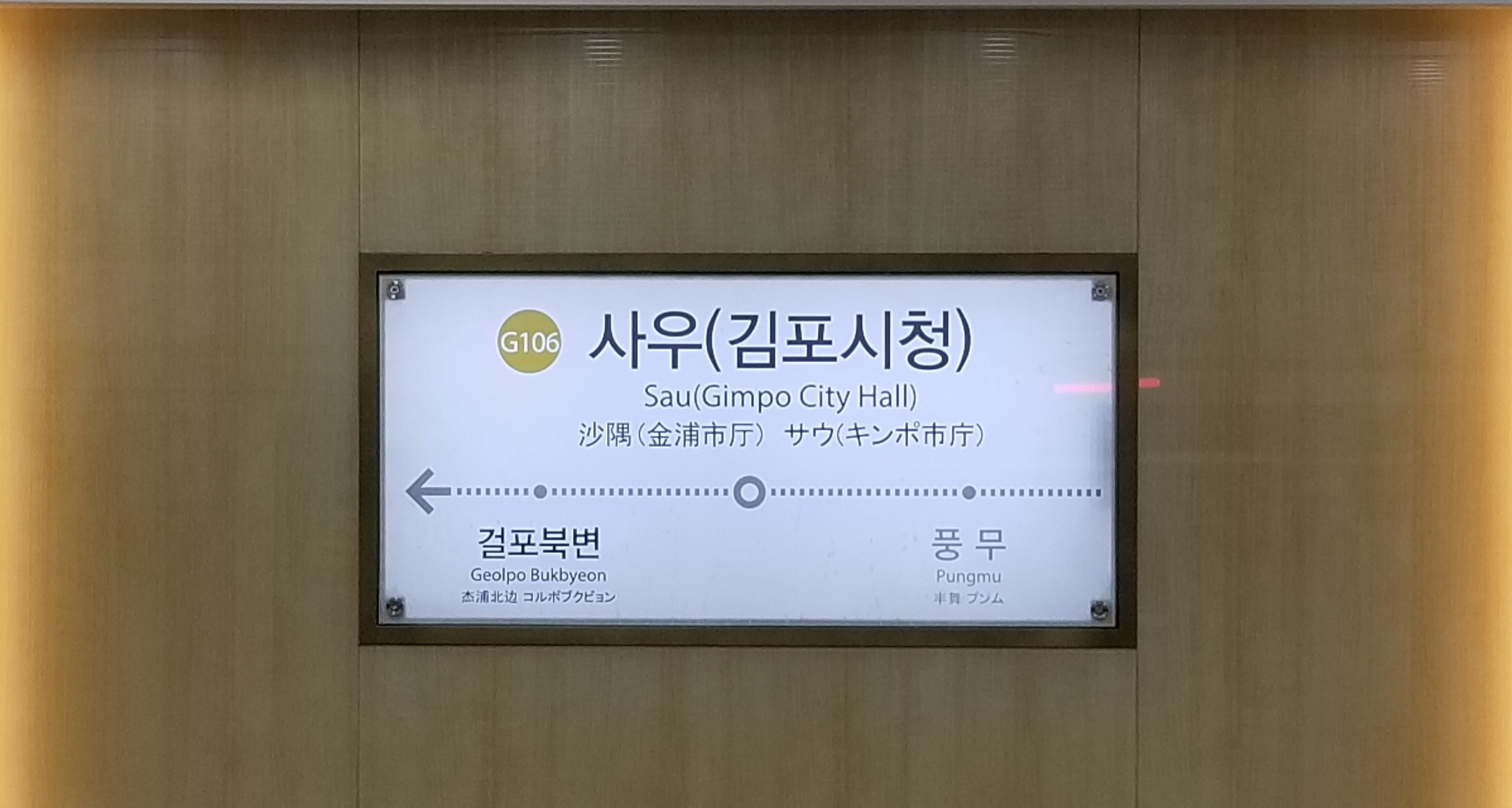 김포도시철도 사우역 역명판